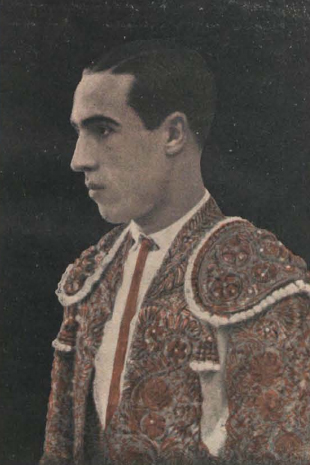 El novillero Miguel Morilla "El Atarfeño" en la fotografía publicada por la revista "La Fiesta brava", 168 (1930)